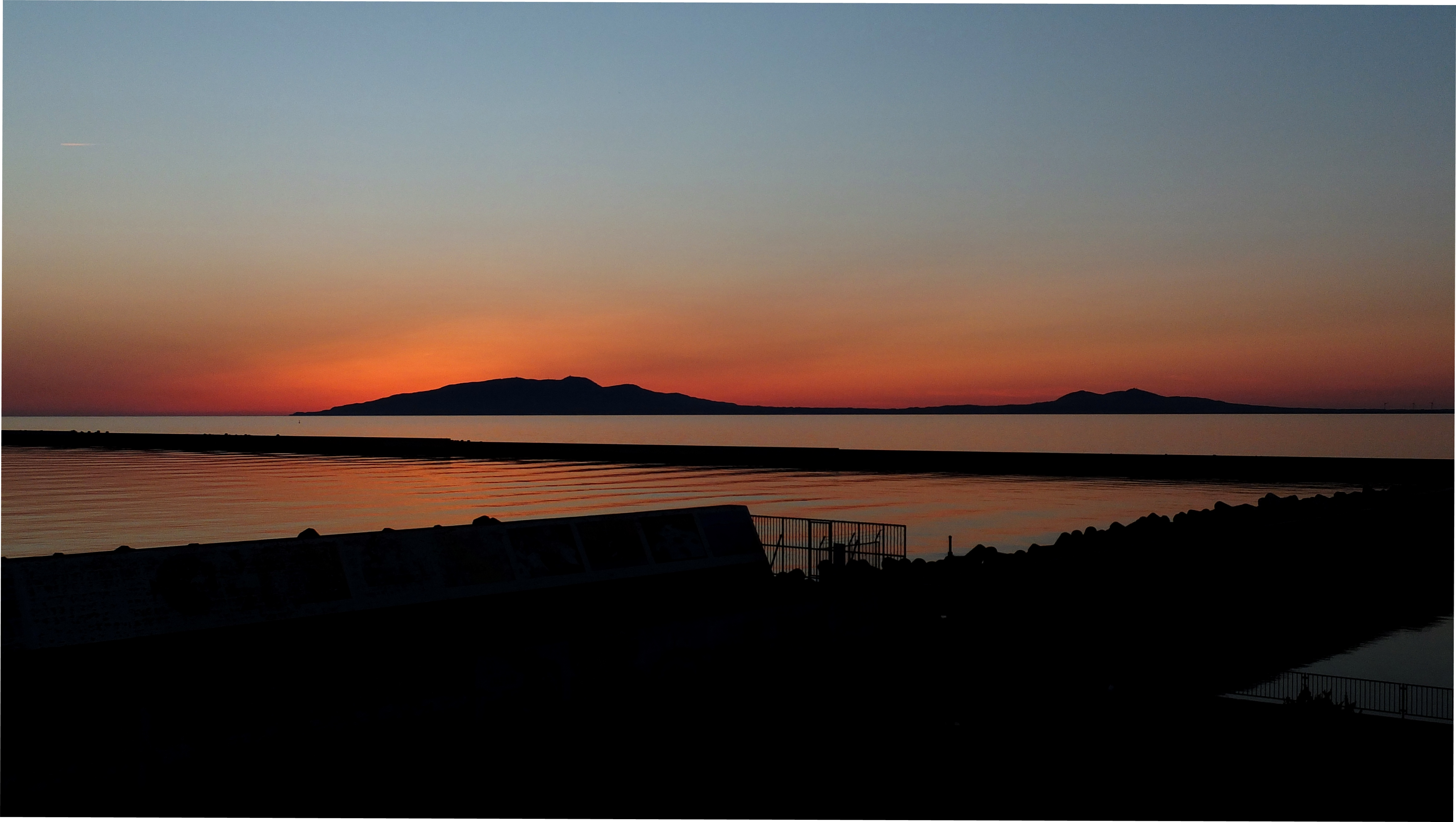 秋田マリーナから眺める男鹿半島の夕景。